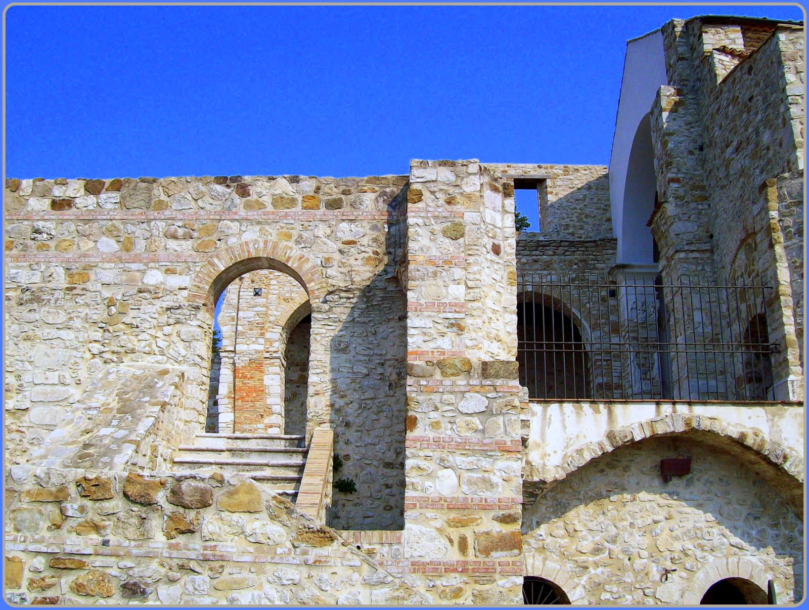 Parco archeologico urbano di Compsa - MIBAC This is a photo of a monument which is part of cultural heritage of Italy.